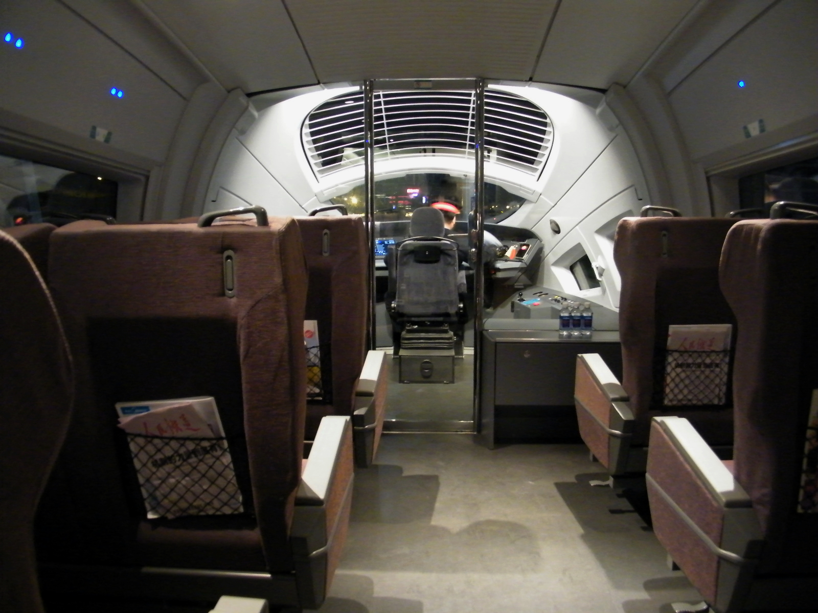 中文（中国大陆）: 京津城际CRH3C的特等座舱与驾驶舱以透明玻璃区隔